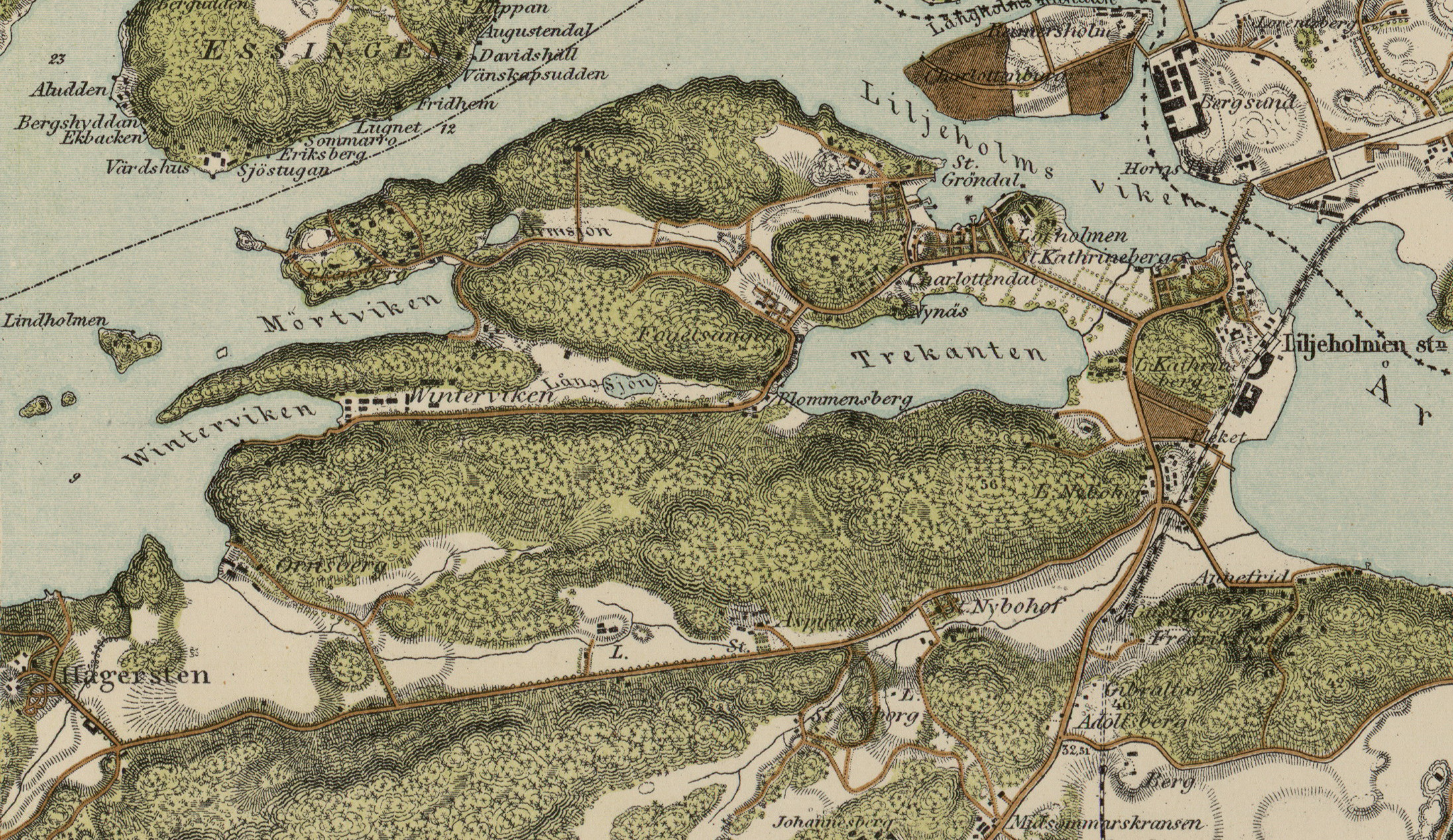 Trakten omkring Stockholm i IX blad (del av kartan visande Gröndal)